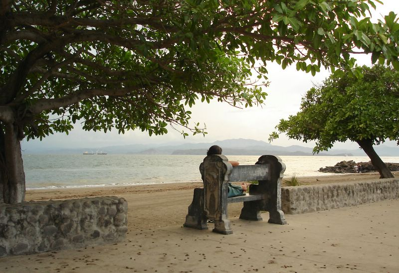 Vista de la playa de Puntarenas desde el Paseo de los Turistas, Puntarenas, Costa Rica.